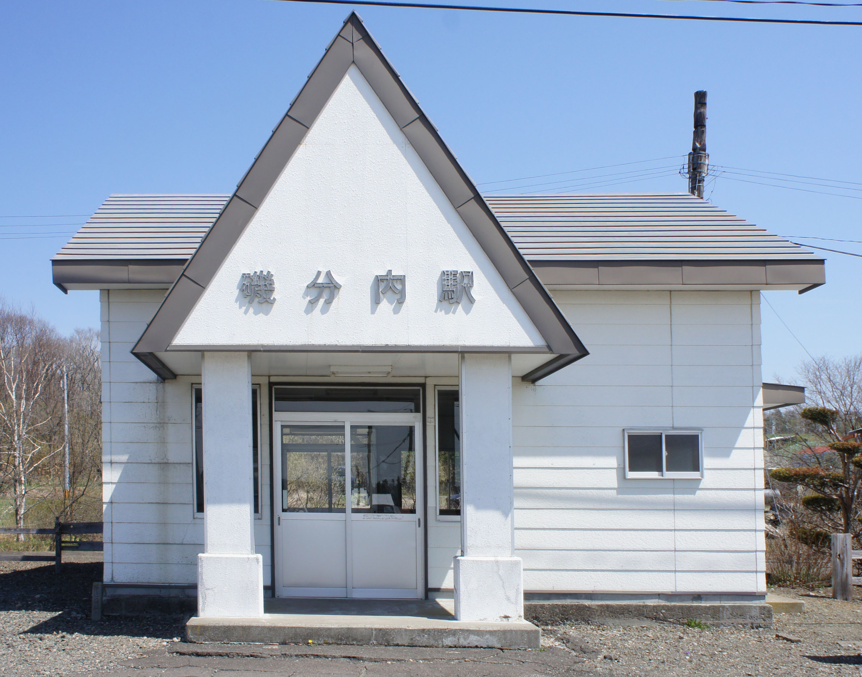 JR釧網本線・磯分内駅の駅舎 Sony NEX-3